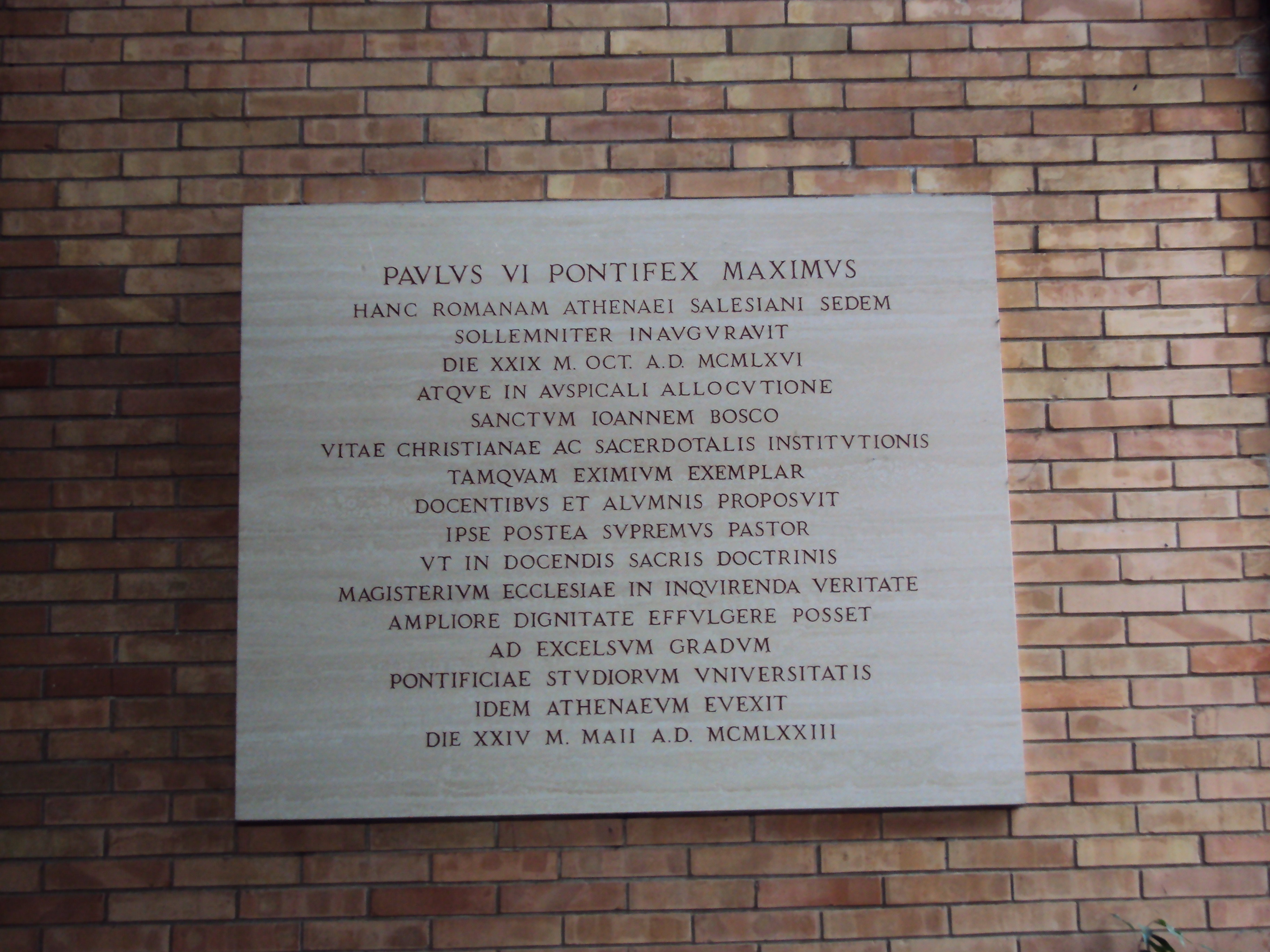 UPS Roma